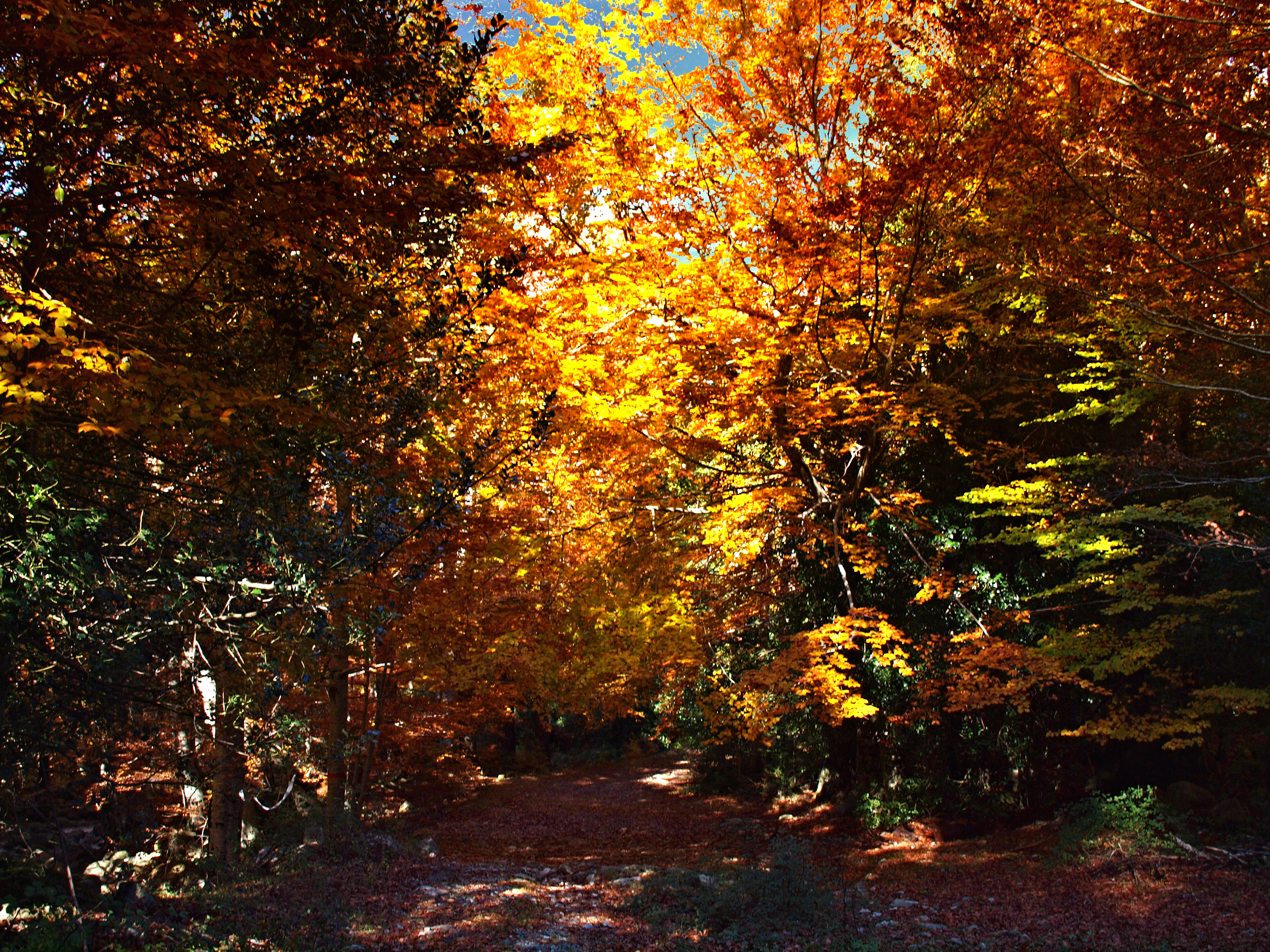 Vivario (Corsica) - Chemin forestier dans la forêt de Vizzavona